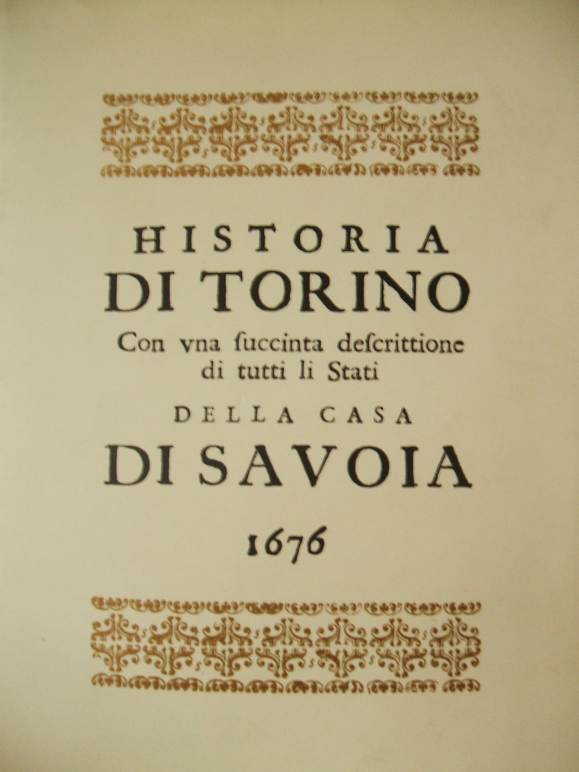 Copertina deHistoria di Torino con una succinta descrizione di tutti li Stati della Casa di Savoia, di Giovanni Andrea Pauletti (Padova, 1676). Transcript HISTORIA DI TORINO Con vna ſuccinta deſcrittione di tutti li Stati DELLA CASA DI SAVOIA 1676